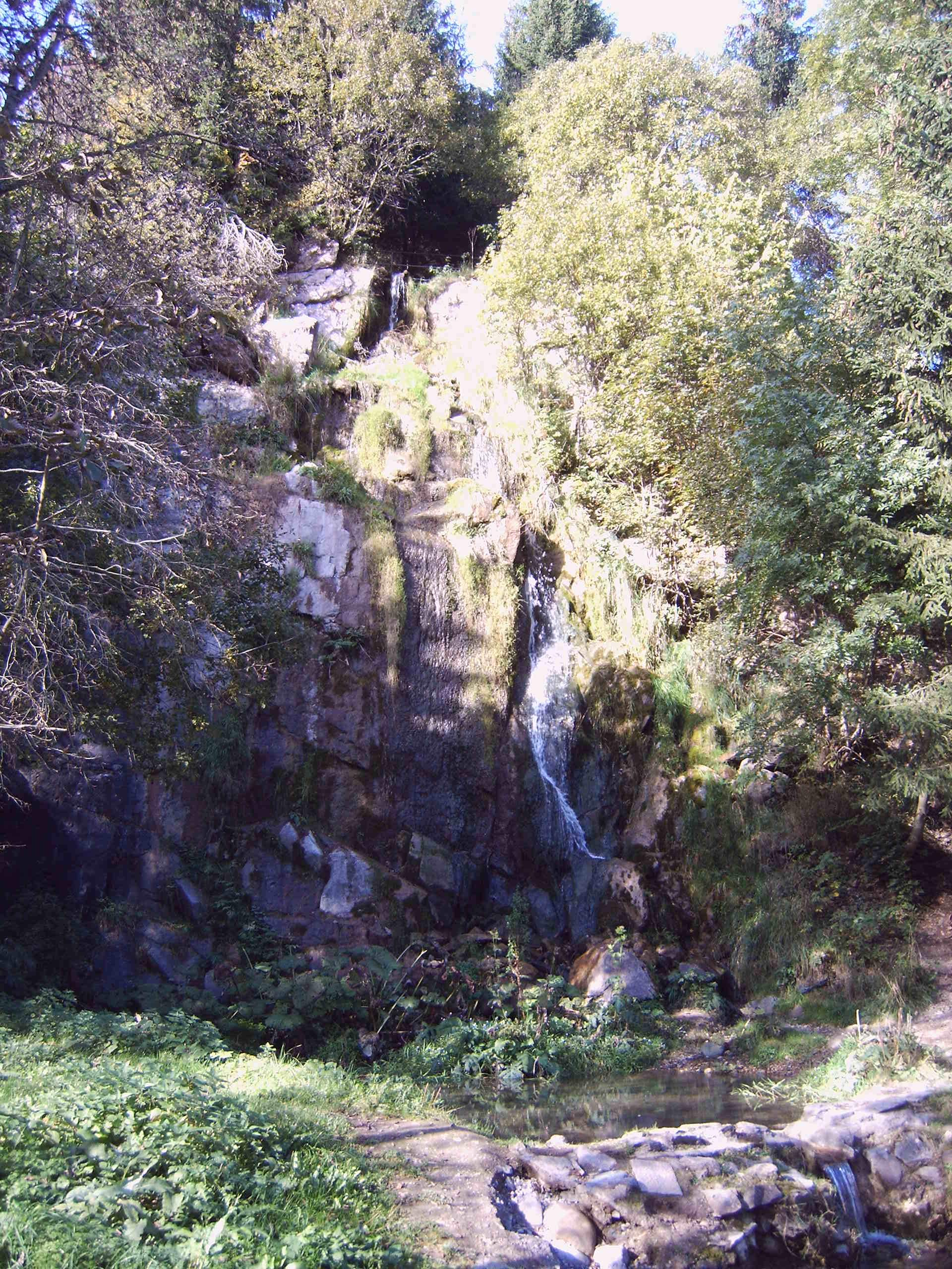 Wasserfall in Königshütte, Sachsen-Anhalt, Deutschland